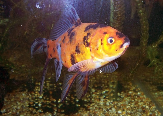 Shubunkin